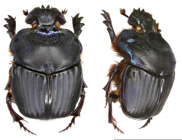 Familie; Scarabaeidae Groesse: 19-30 mm Fundort: Paraguay, San Pedro, 1982 det. U.Schmidt, 2006 Photo: U.Schmidt, 2006